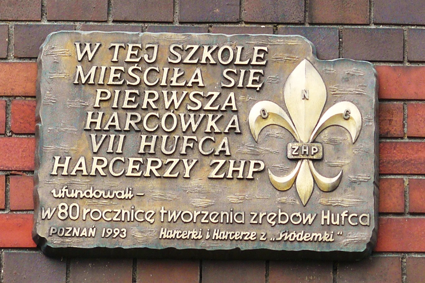 Szkołą przy ul. Słowackiego 54/60 w Poznaniu.